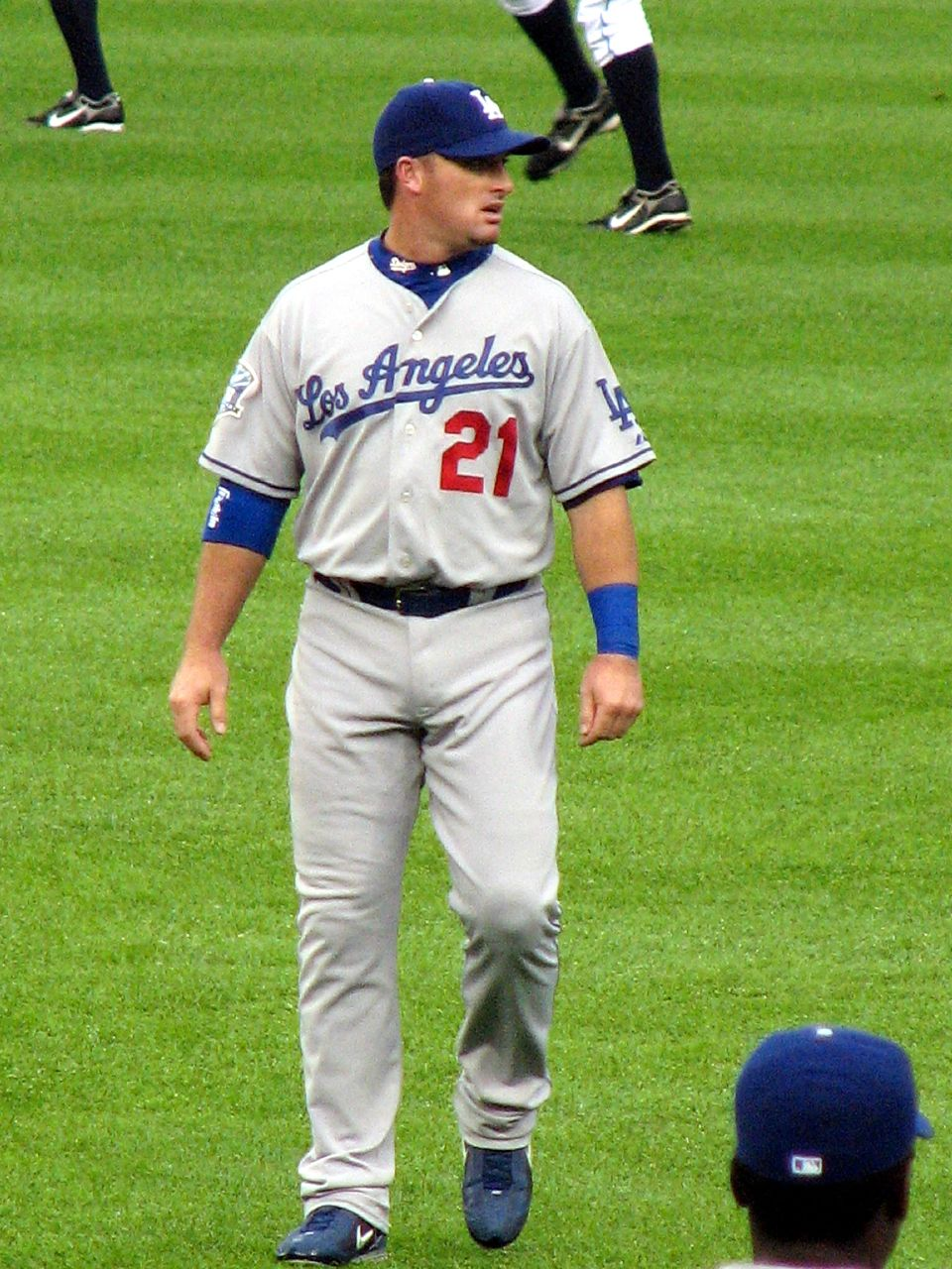 Mark Sweeney